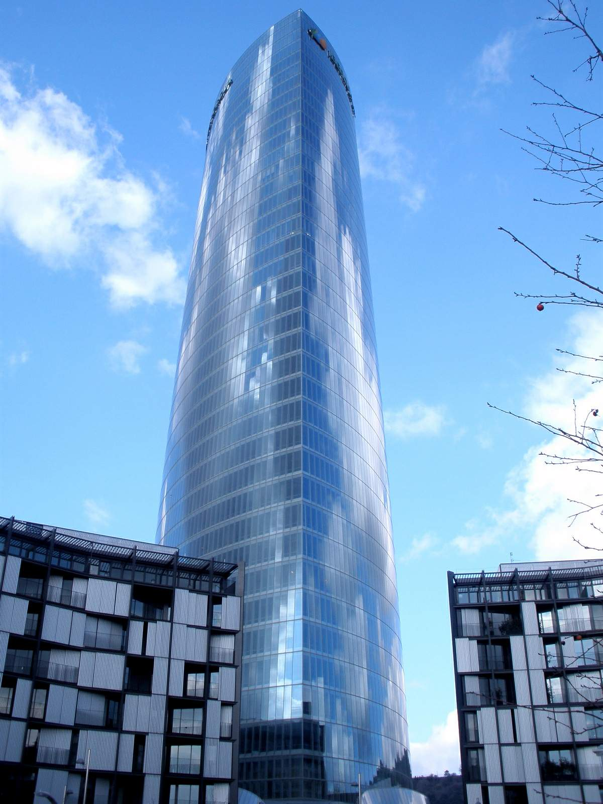 Iberdrola Tower, Bilbao.